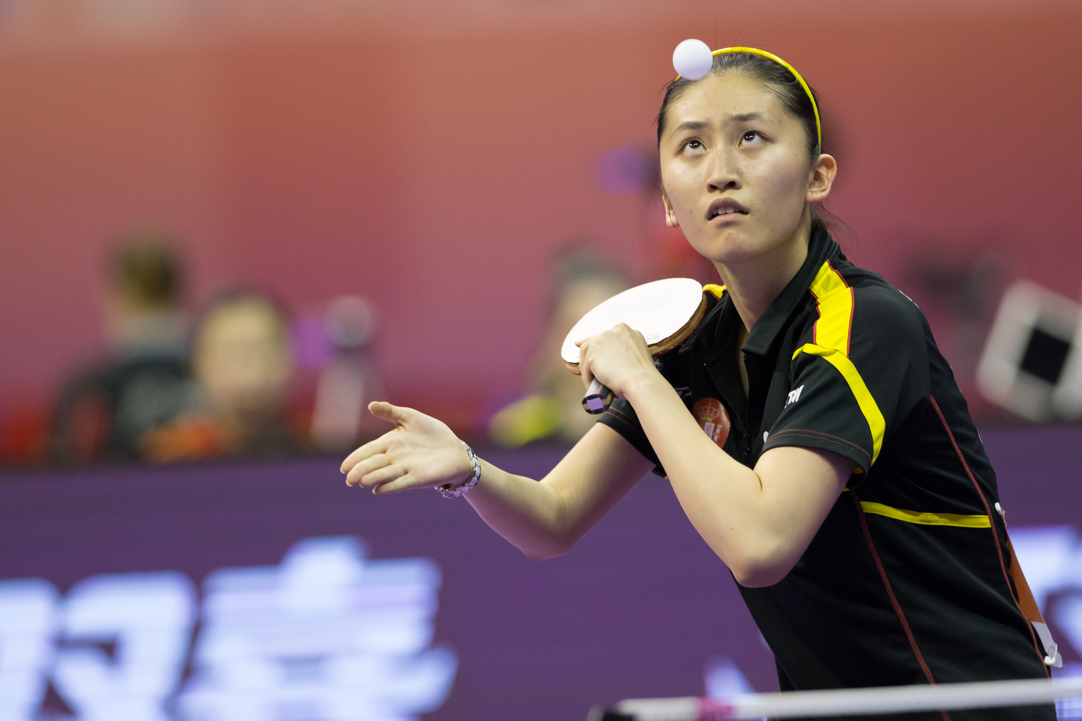 _K0K8418